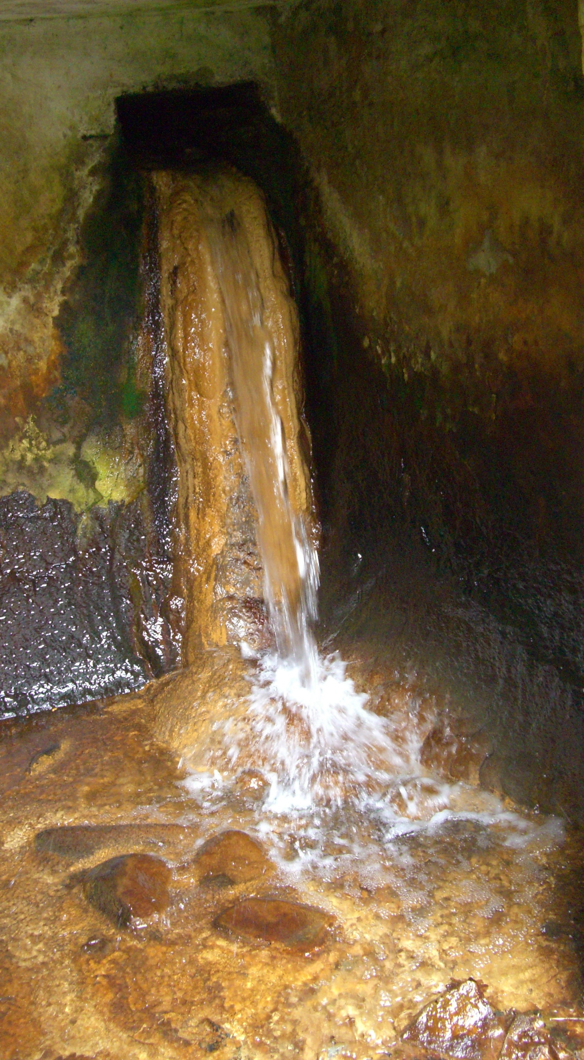 Eine Heilquelle von Crni Guber